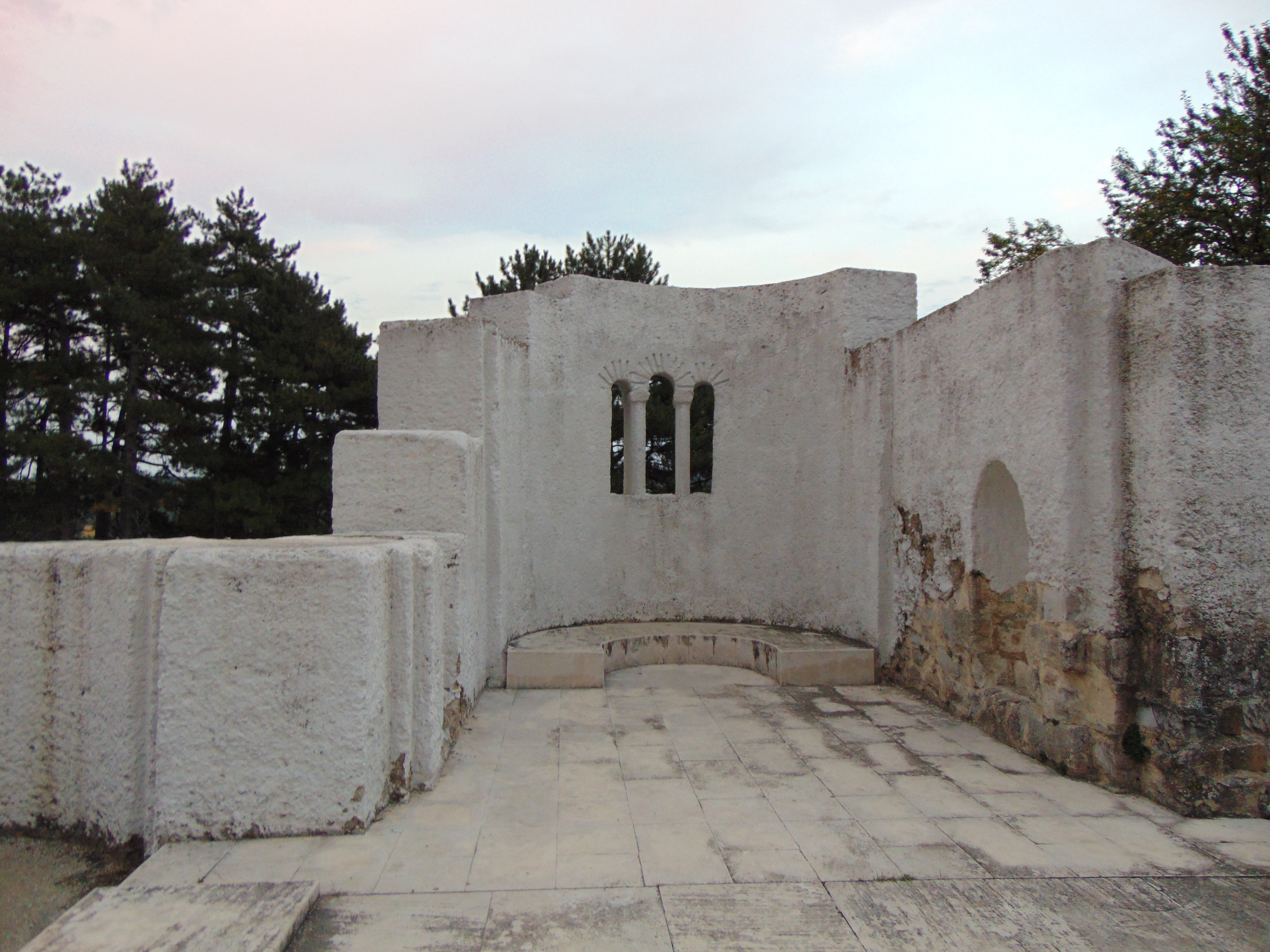 Кръглата църква Преслав